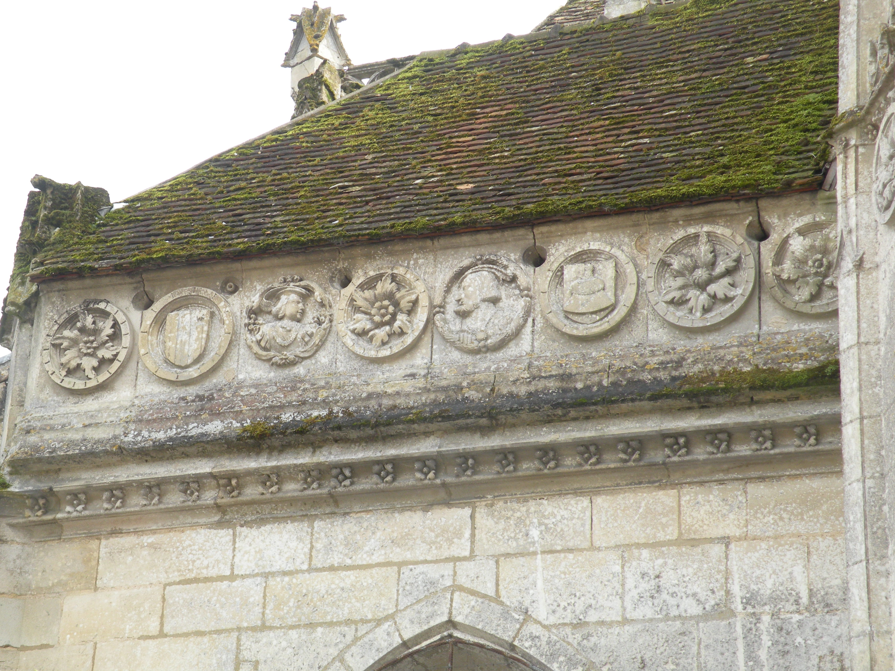 Église de chaumont en vexin frise à gauche du portail avec françois 1er et le dauphin dans les medaillons